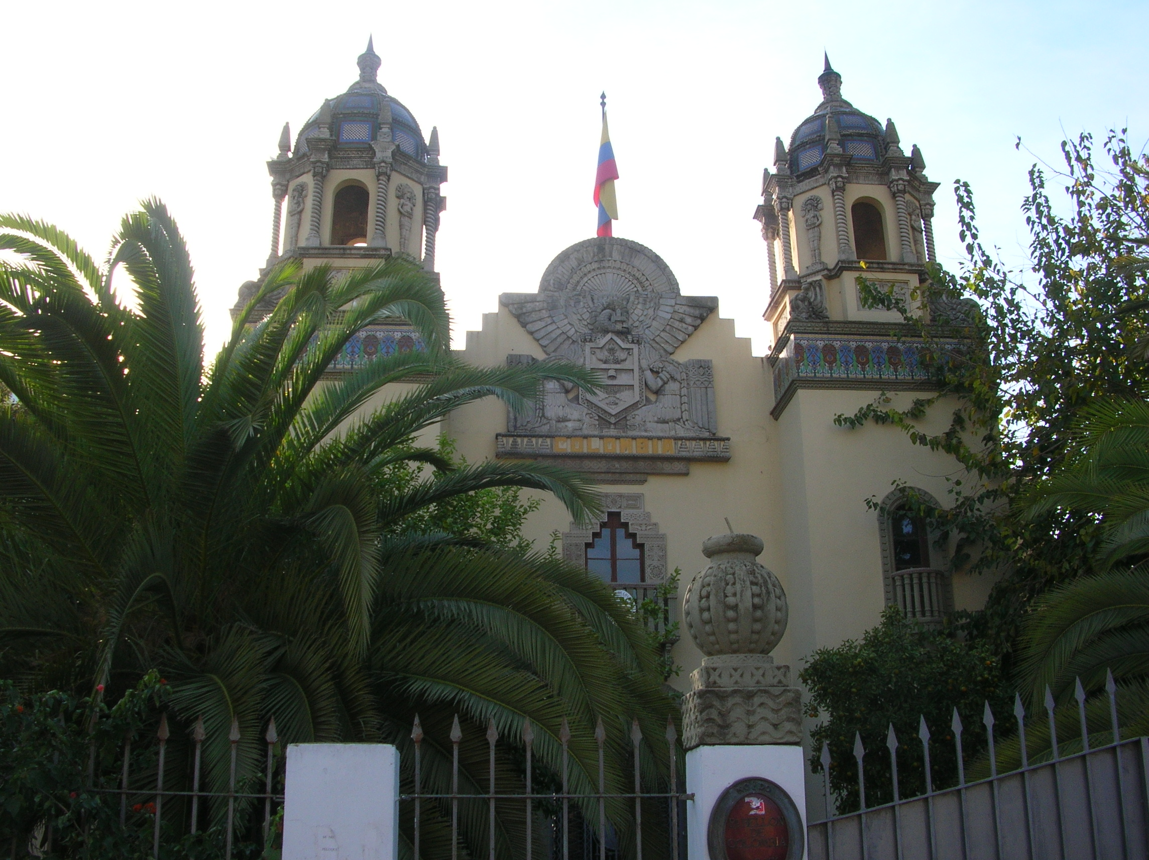 Le pavillon colombien de l'expo ibéro-américaine de 1929 de Séville